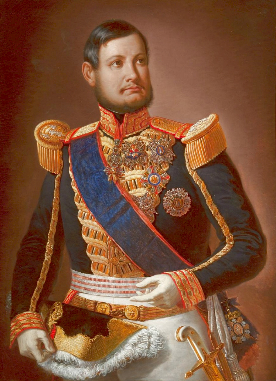 Ritratto di Ferdinando II (1810-1859)